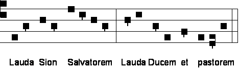 Inanité des épisèmes verticaux : Exemple de décalage sur Lauda Sion